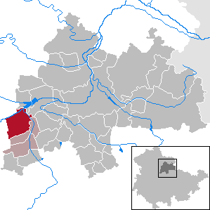 Gebesee in Thuringia - District Sömmerda